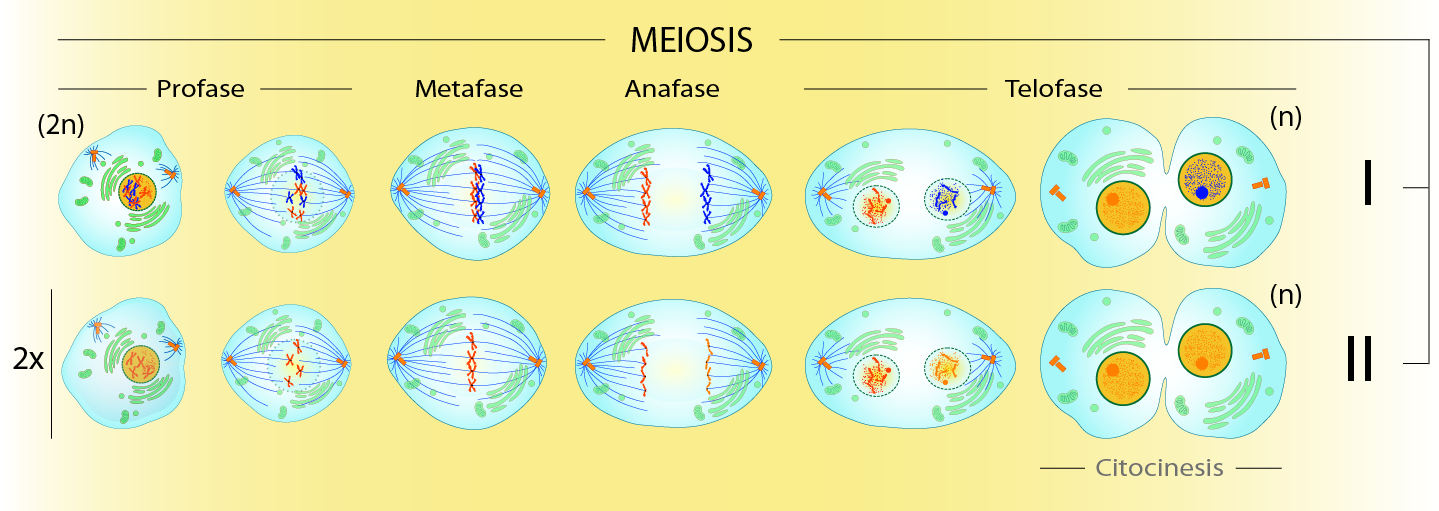 Este trabajo está basado en: MITOSIS cells secuence